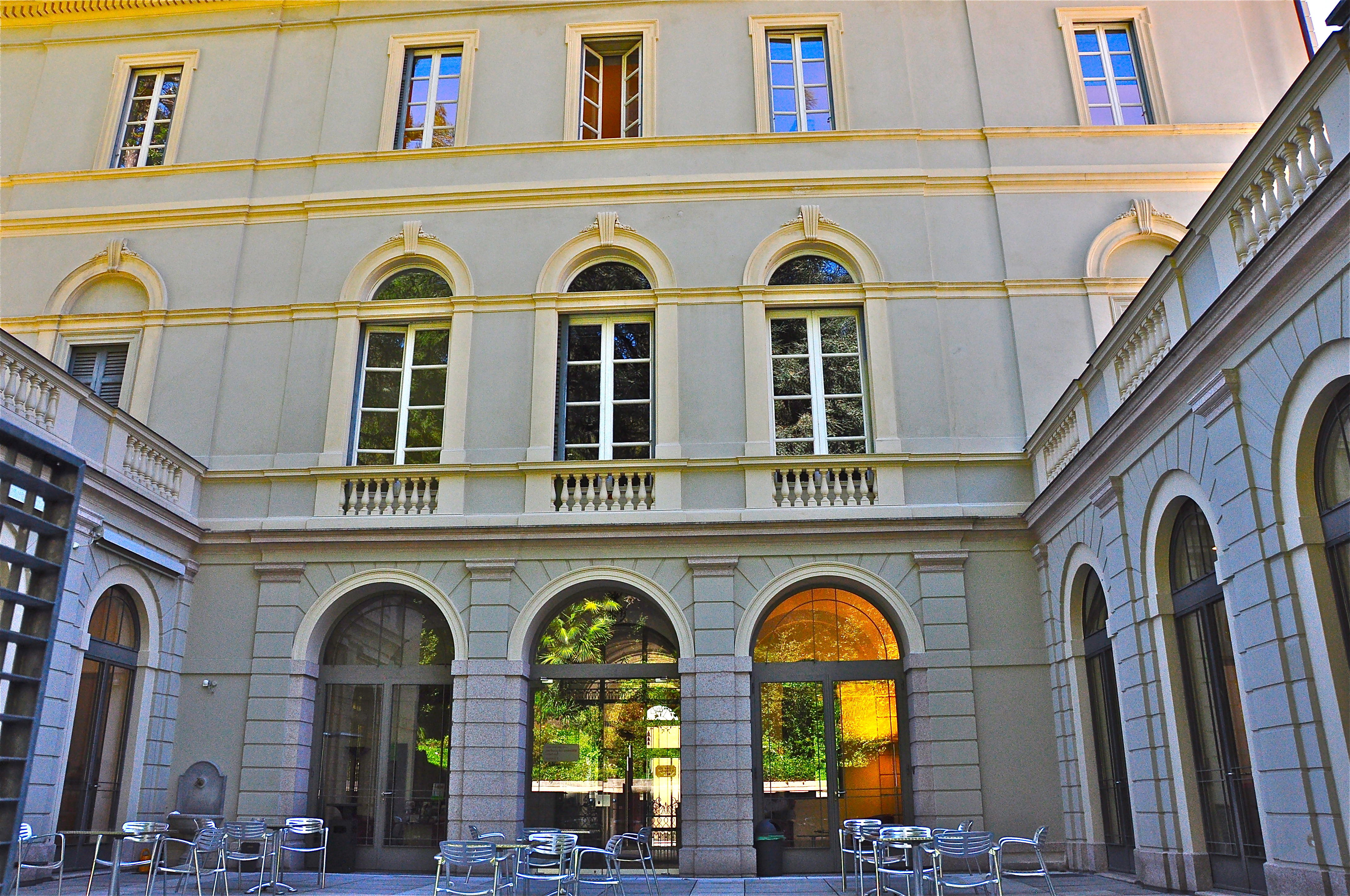 Facciata interna della Biblioteca Cantonale Locarno